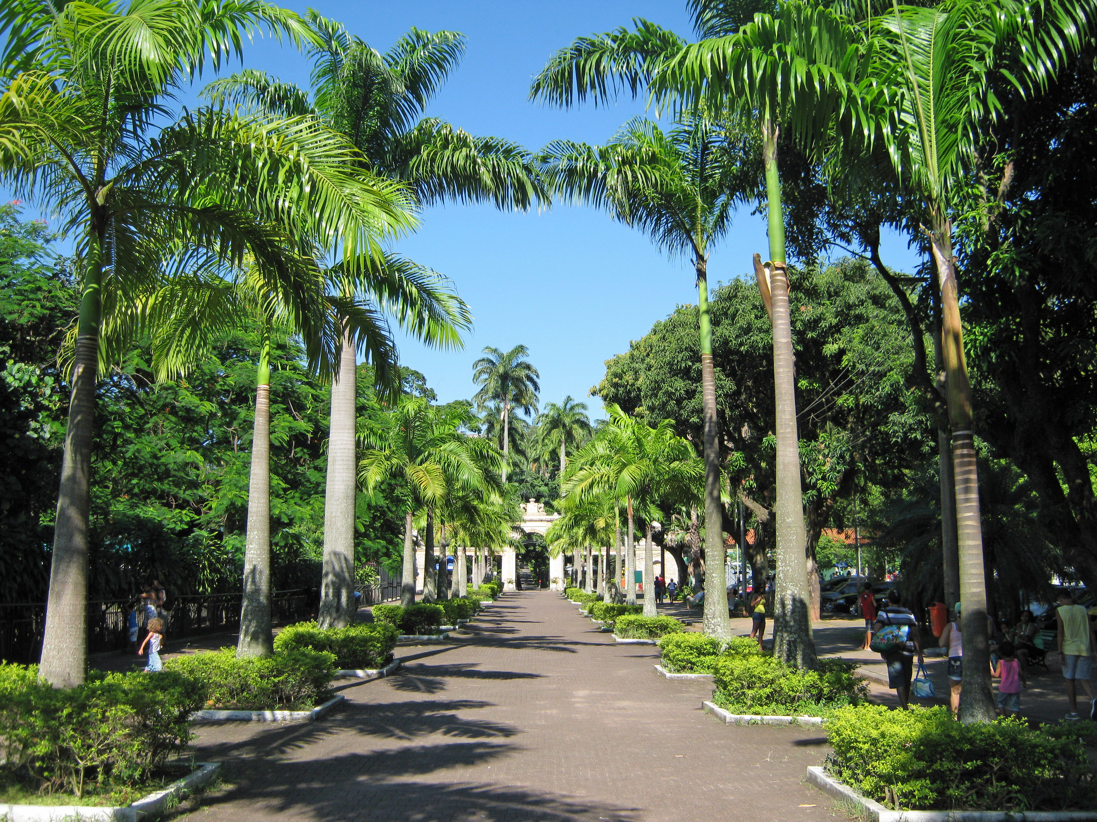 Quinta da Boa Vista - Entrada do jardim Zoológico